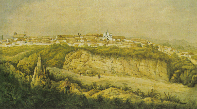 Santa Rosa de Osos tal como se veía en la segunda mitad del siglo XIX, acuarela sobre papel, 16×24,8 cm.